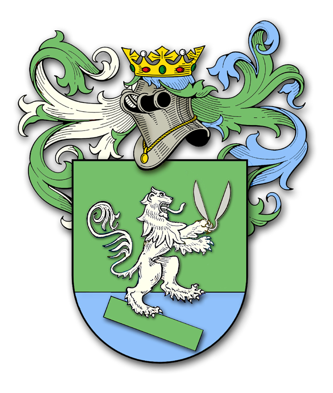 Brasão da família Sartori de Asolo